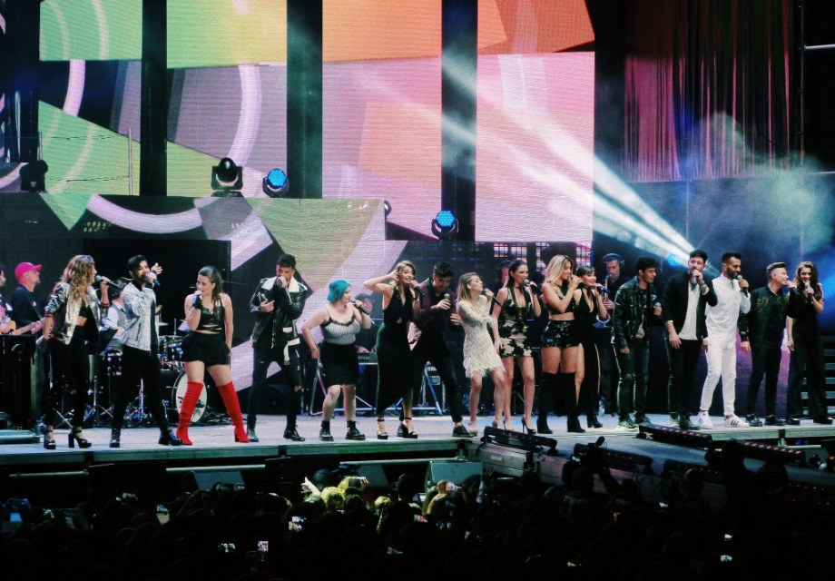 Los chicos de Operación Triunfo 2017 en Pamplona: Lola Índigo, Amaia, Aitana, Miriam Rodríguez, Alfred García, Ana Guerra, Agoney Hernández, Roi Méndez, Luis Cepeda, Nerea Rodríguez, Raoul Vázquez García, Mireya Bravo, Ricky Merino, Thalía Garrido, Juan Antonio, Marina Rodríguez